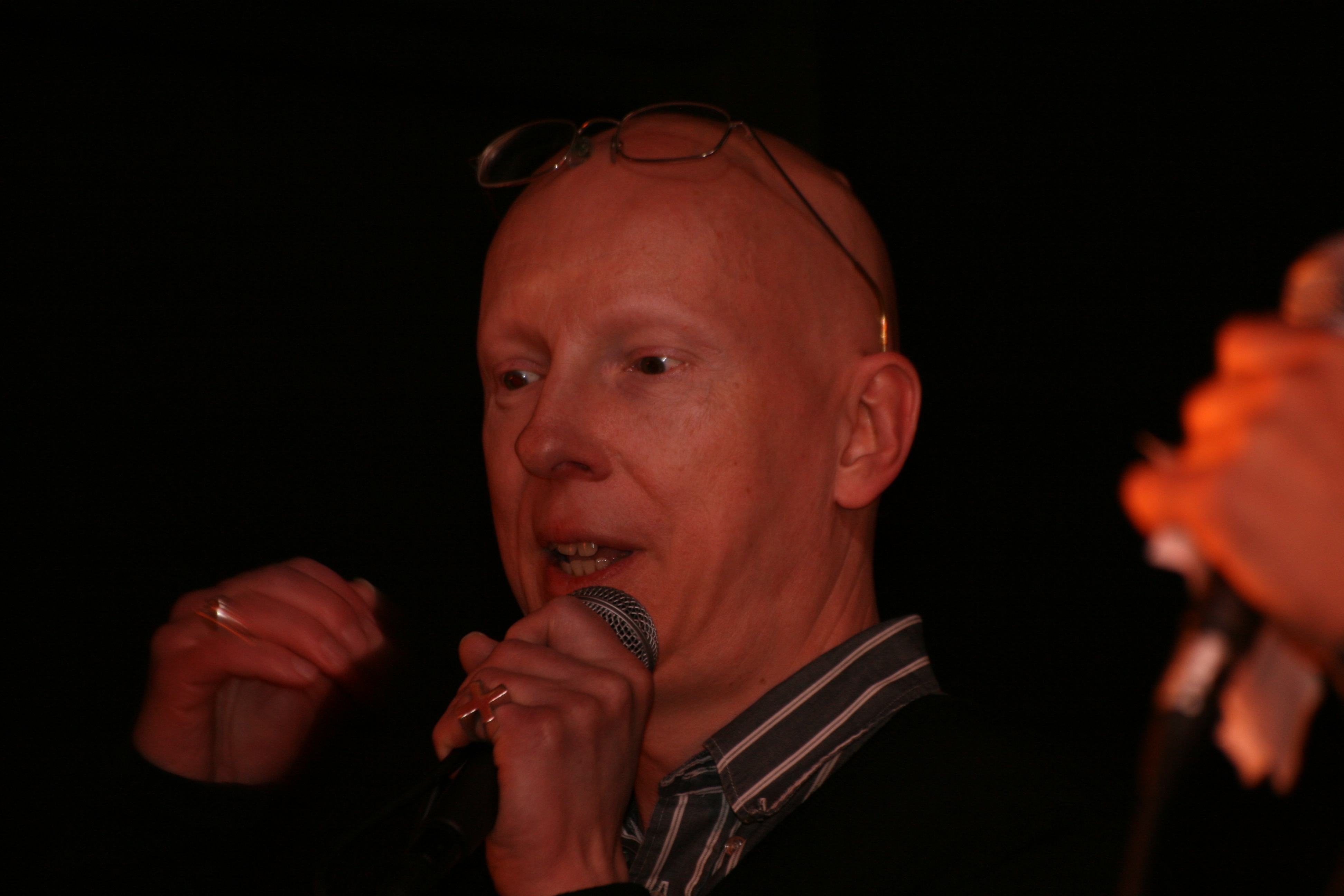 tävlar för Uppsala. Poetry Slam SM 2008 torsdag (snygg ring har han på lillfingret också)